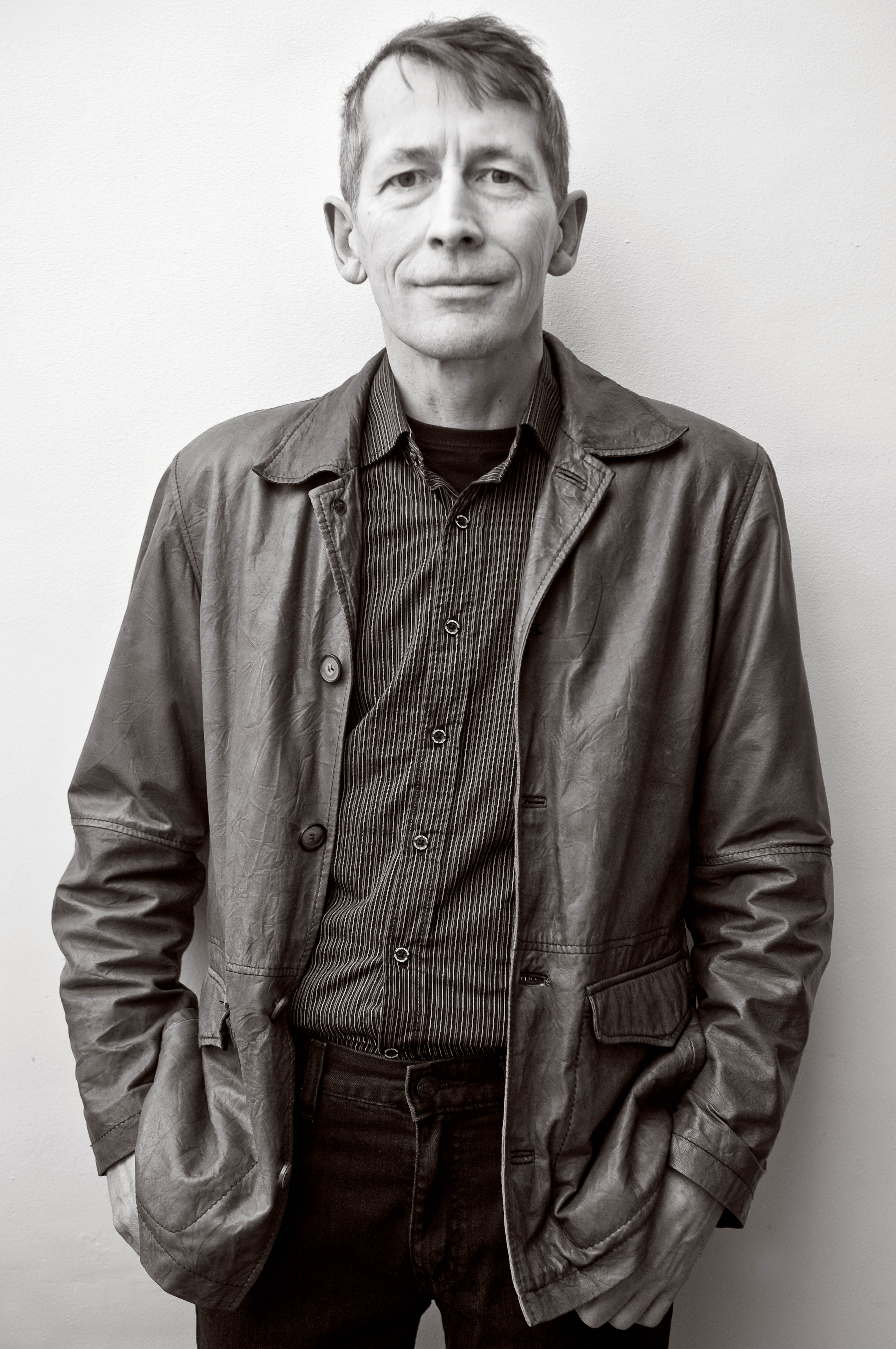 Vlaams schrijver